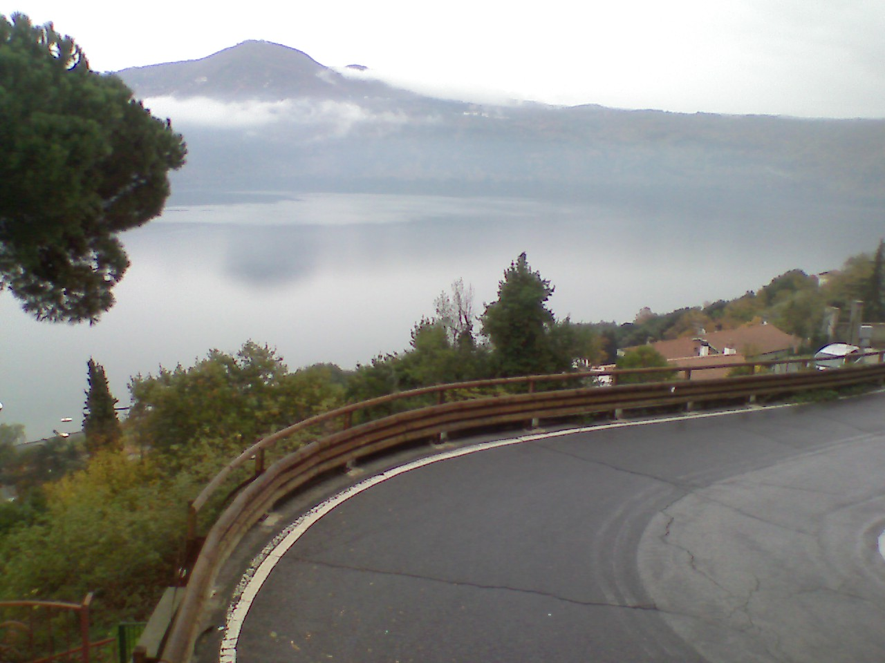 Curvone Statale 140 Lago Albano Castel Gandolfo